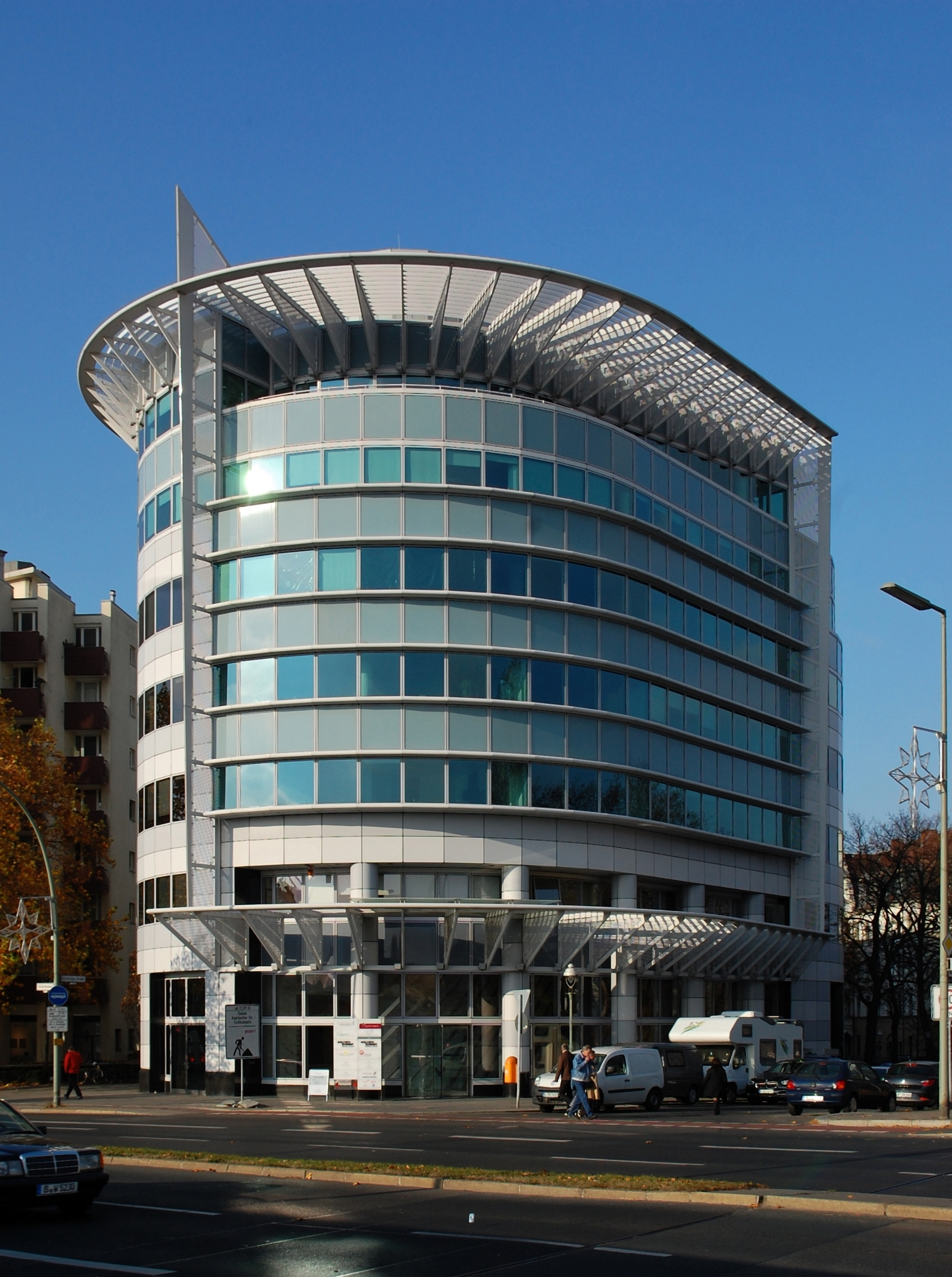 Office-Building Kurfürstendamm 119/120, Berlin